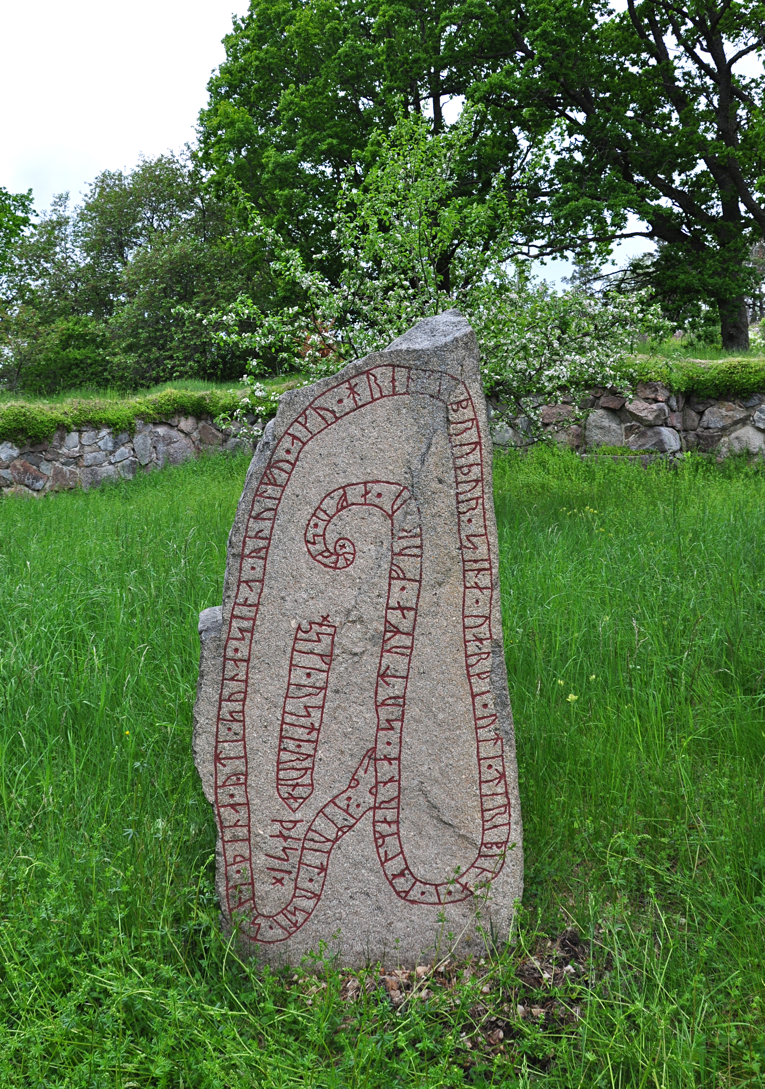 Runsten Sö 333 utanför Ärja ödekyrka (ruinen syns i bakgrunden), Södermanland.